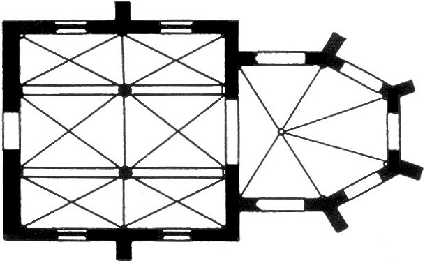 Grundriss der Schlosskapelle Grimberg, heute Schloss Herten